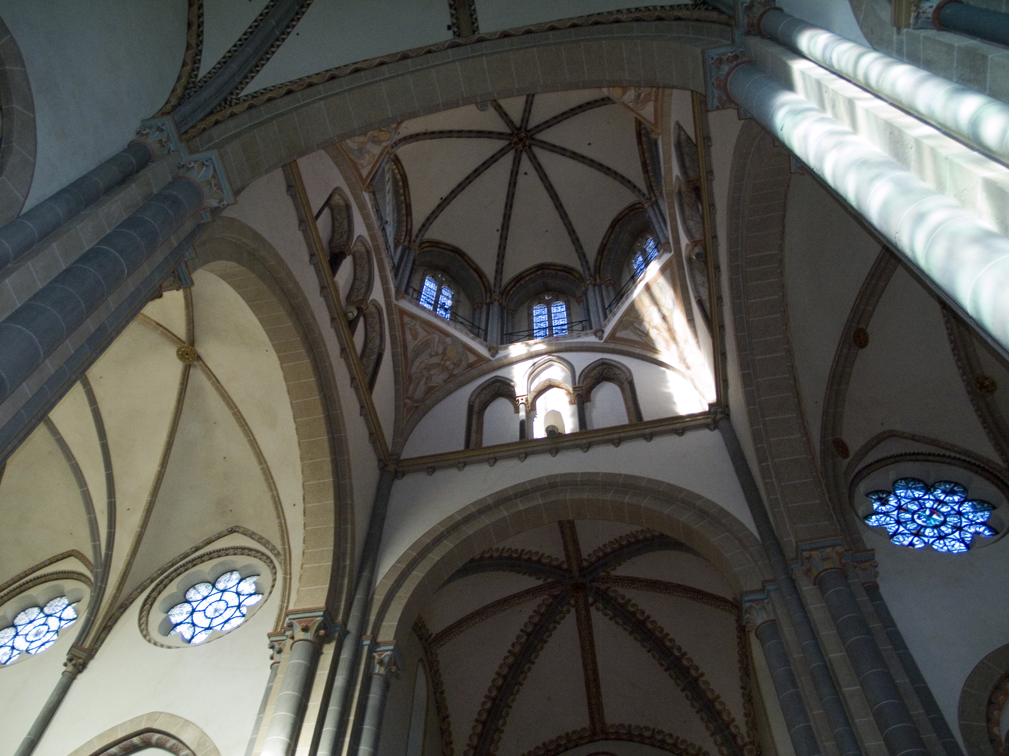 Северный Рейн-Вестфалия, Эссен, Верден - Верденское аббатство, церковь Святого Людгера